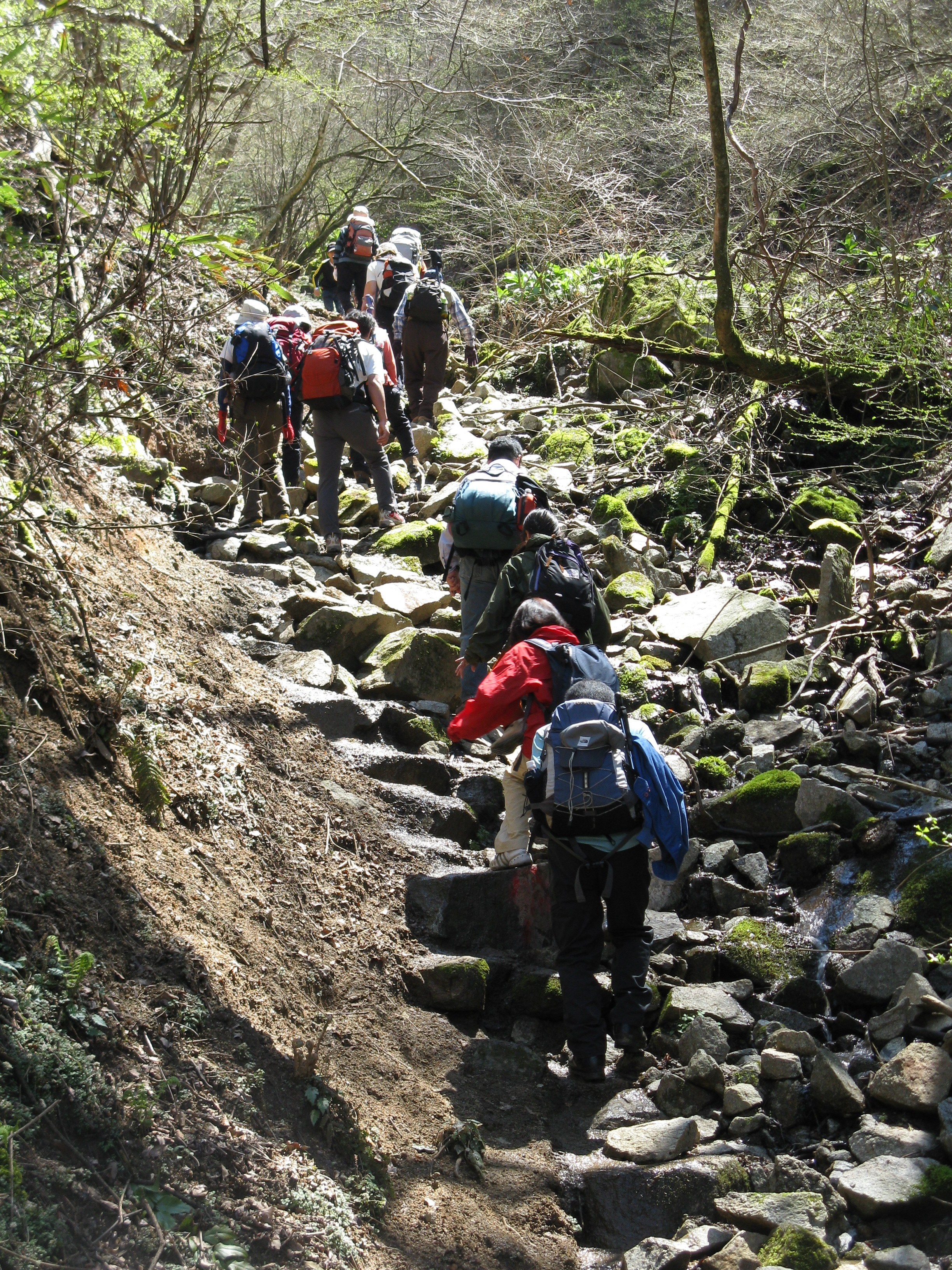 金剛山 カトラ谷登山道